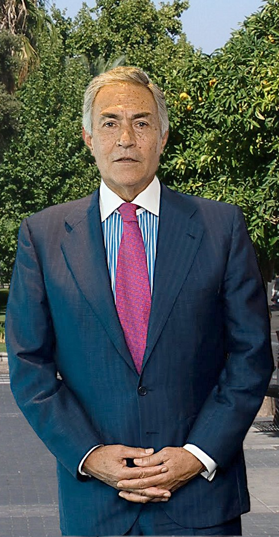 Juan Ignacio Barrero Valverde